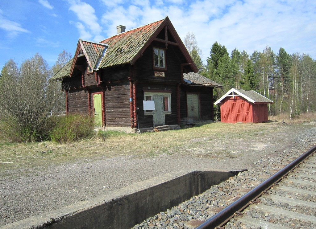 Nor stasjon på Solørbanen